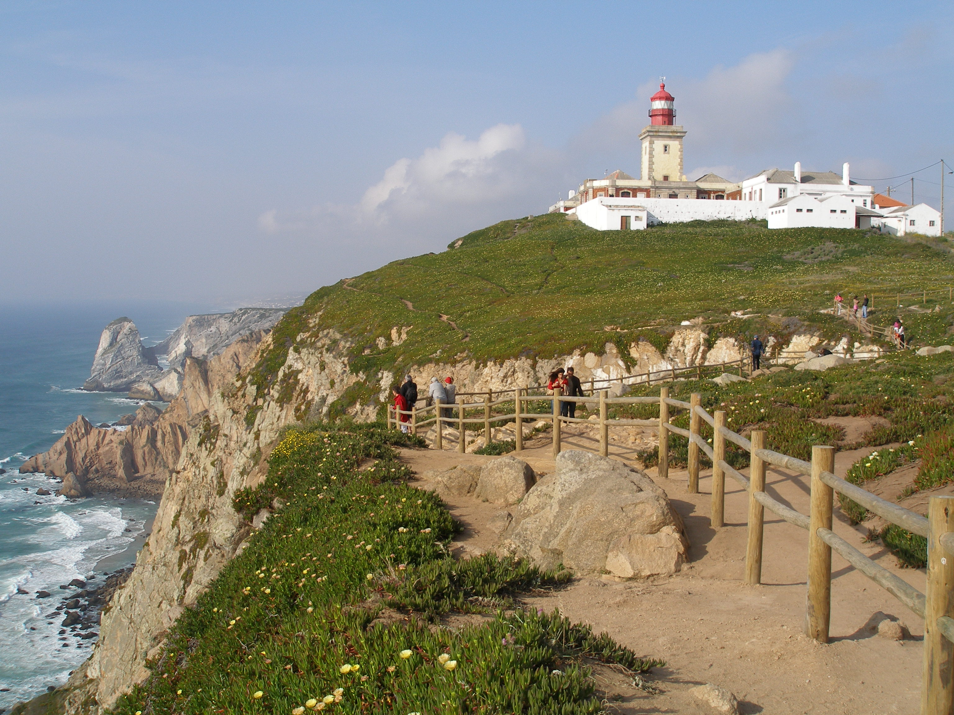 Lighthouse, Cabo da Roca, Portugal